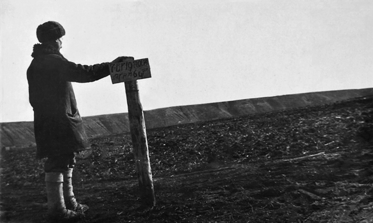 Татарская АССР. Бригадир Шигапов у колышка на ячменном поле. Примечательно, что надпись на колышке на татарском языке выполнена латиницей